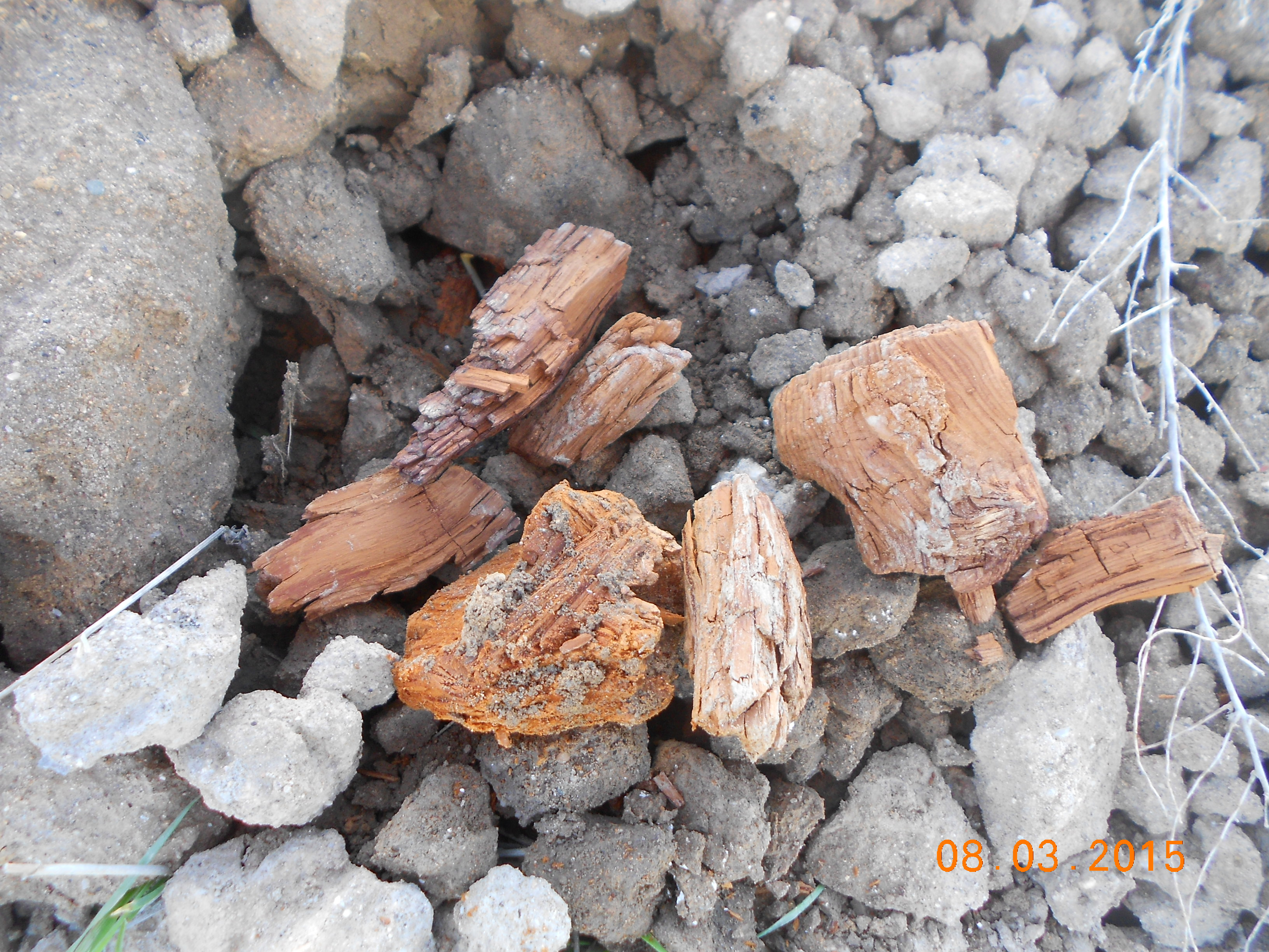 Höyükten çıkan ağaç parçaları.